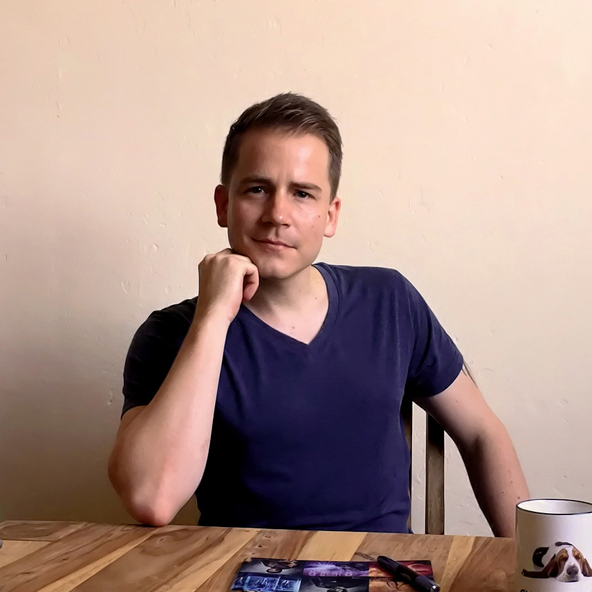 Der Autor Andreas Suchanek bei seiner Arbeit im Oktober 2016. Er ist ein deutscher Autor, der in erster Linie für die Genres Science-Fiction, Horrorliteratur und Fantasy schreibt.